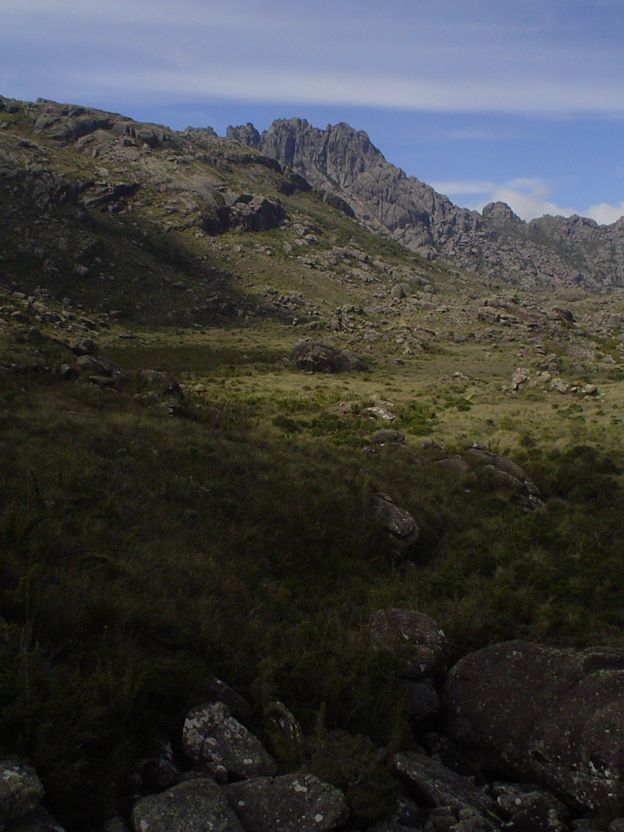 Pico das Agulhas Negras, Rio de Janeiro, Brasil